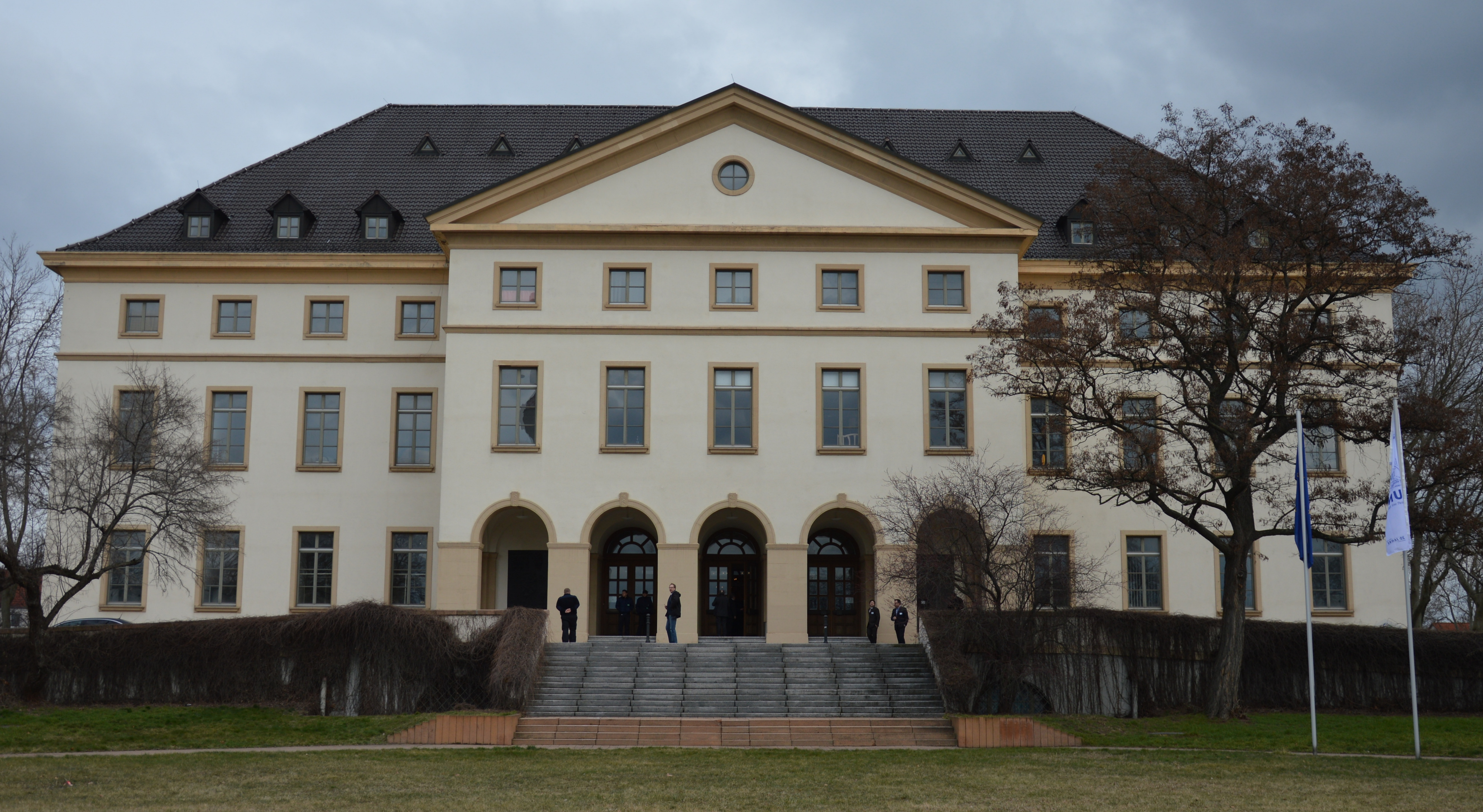 Kulturhaus Leuna